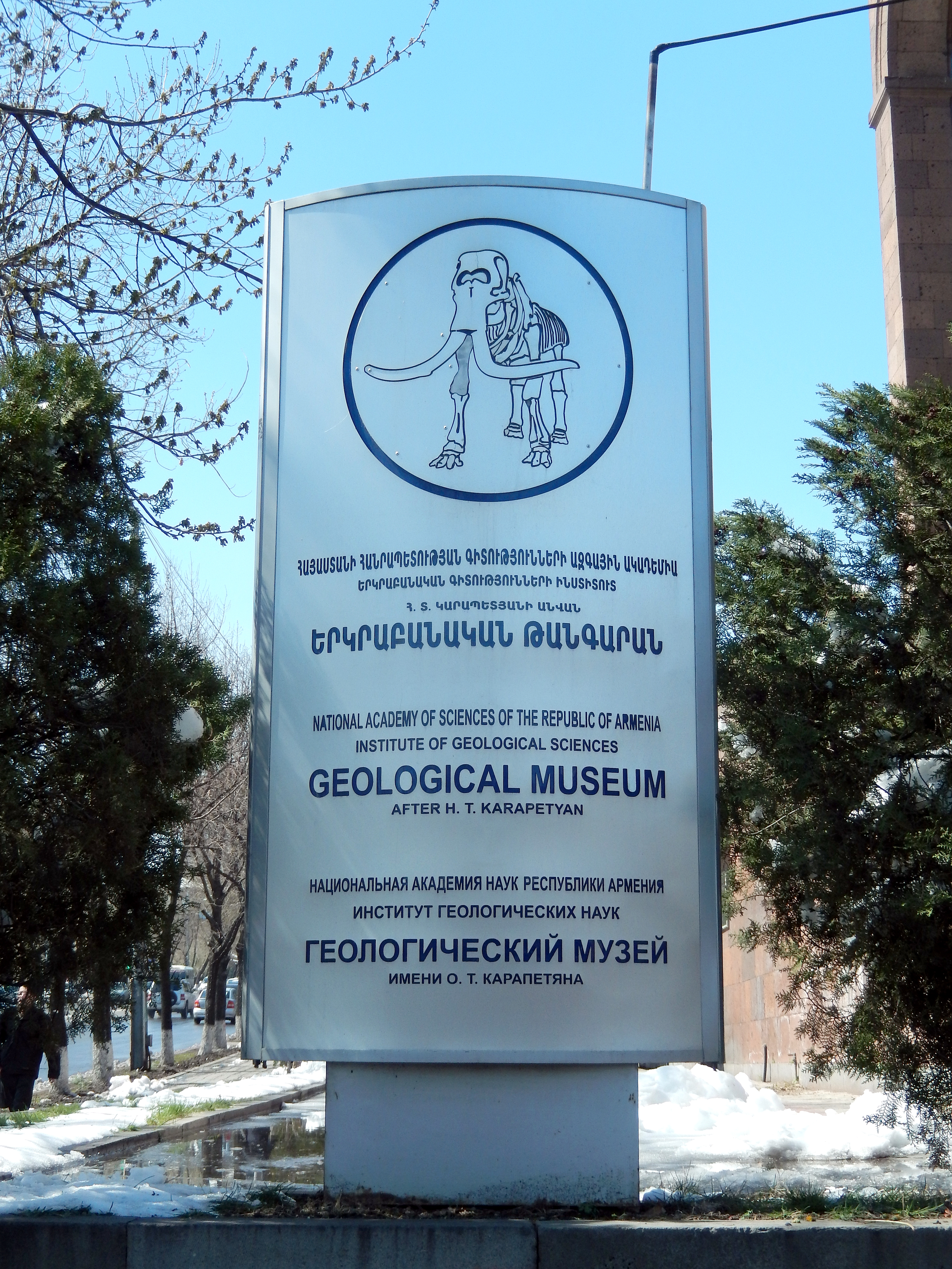 Հովհաննես Կարապետյանի անվան երկրաբանական թանգարան